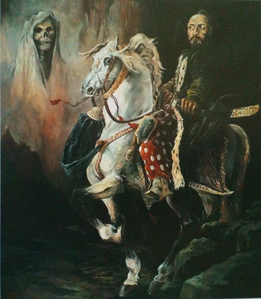 Vision” - rok 1983, 180 x 160, olej na płótnie, fotografia Marek Kubski